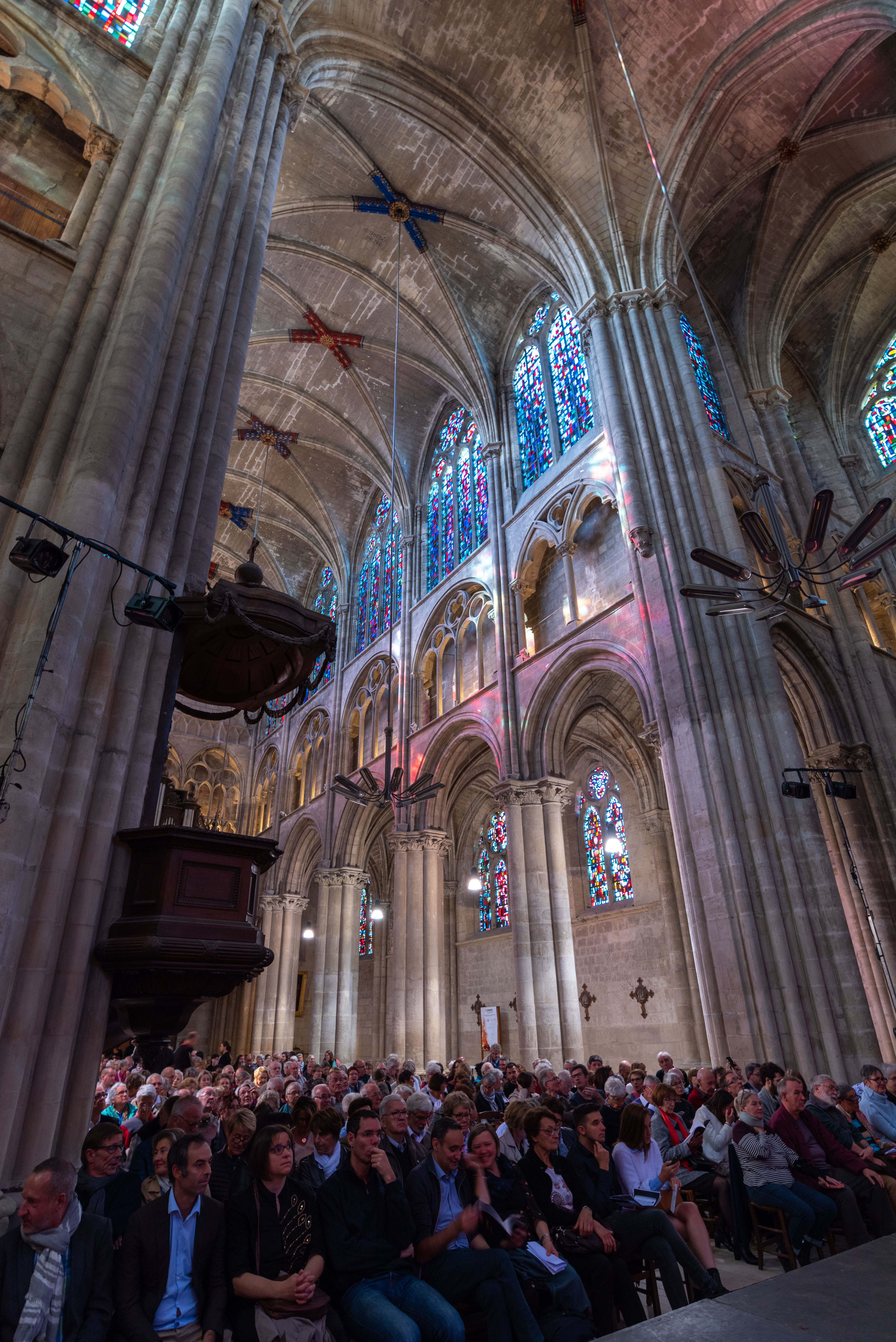 Vue d'une partie de la nef et du transept de l'Église Saint-Julien de Tours. Photo prise dans le cadre du concert Festival Concerts d'automne - Le Chant des Cathédrales